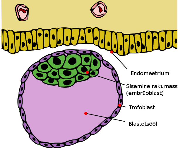 Blastotsüst